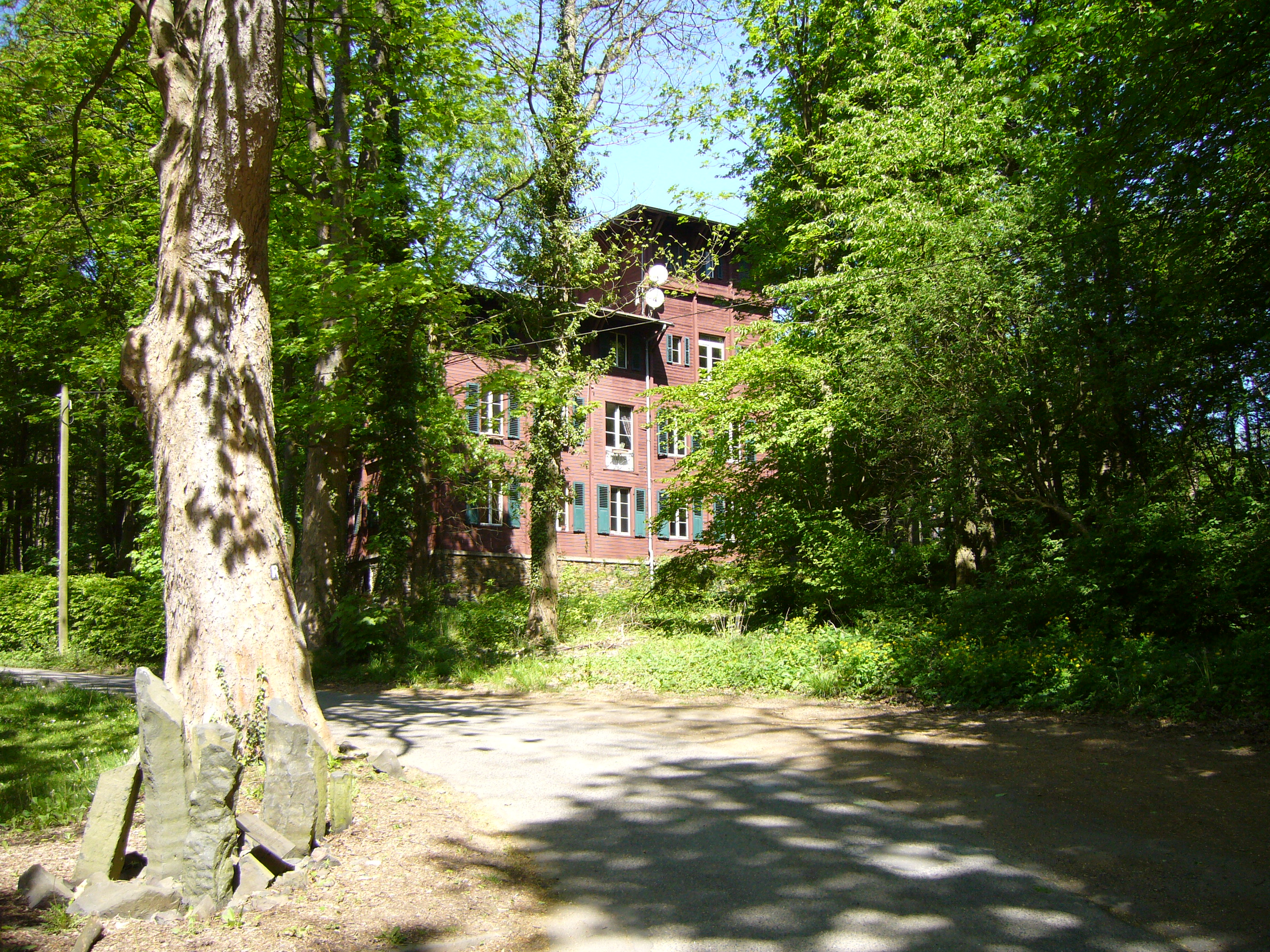 Monrepos